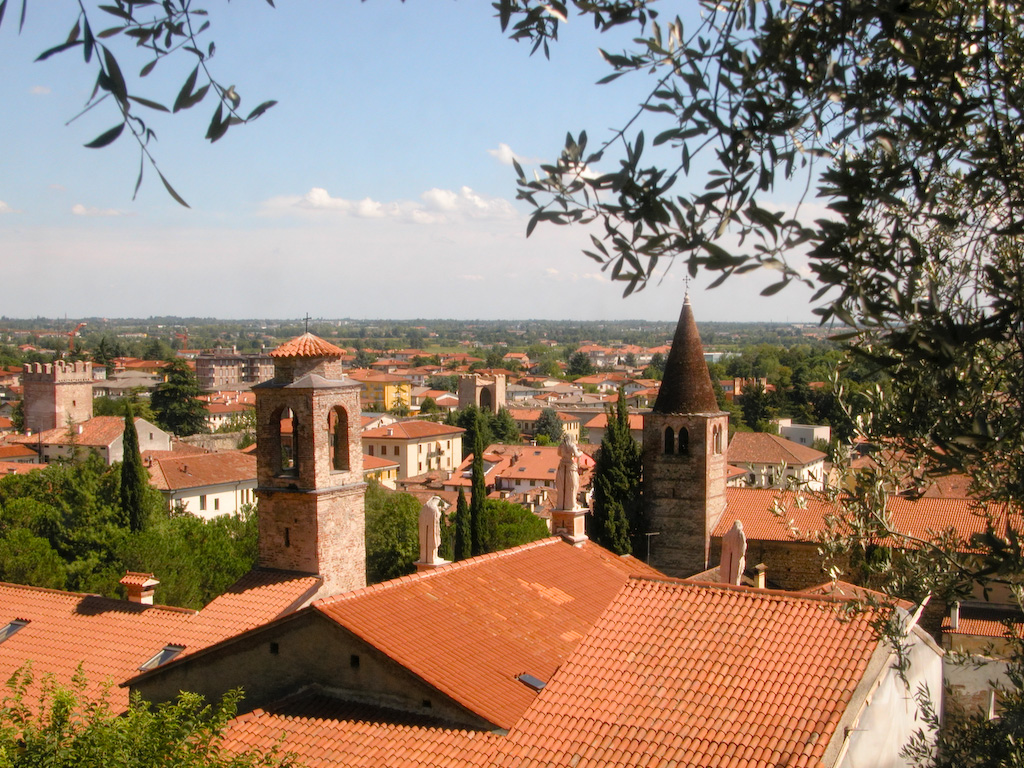 Marostica roofs